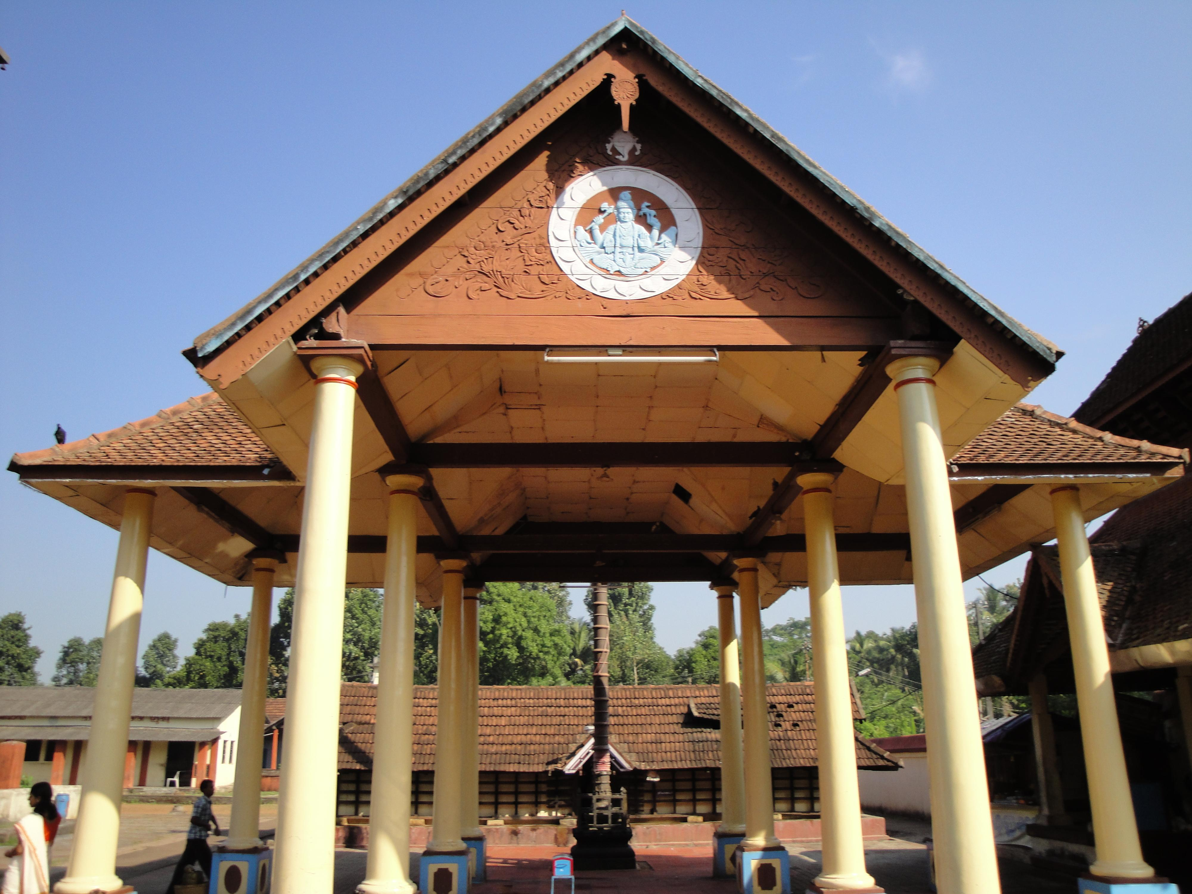 വാഴപ്പള്ളി ഗണപതി അമ്പലം